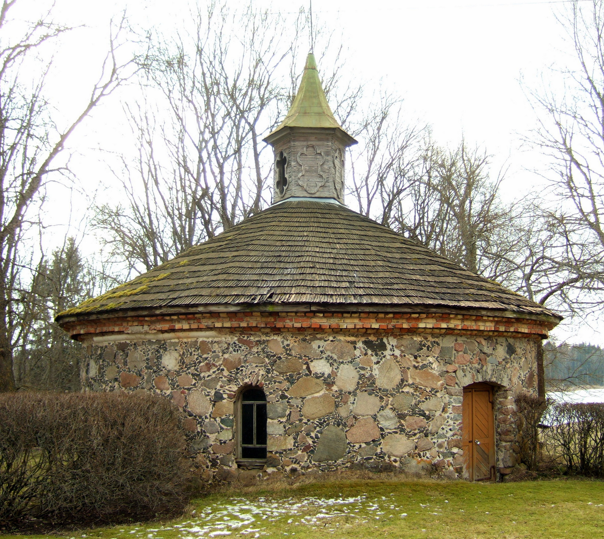 Cirkliškio dvaro ledainė